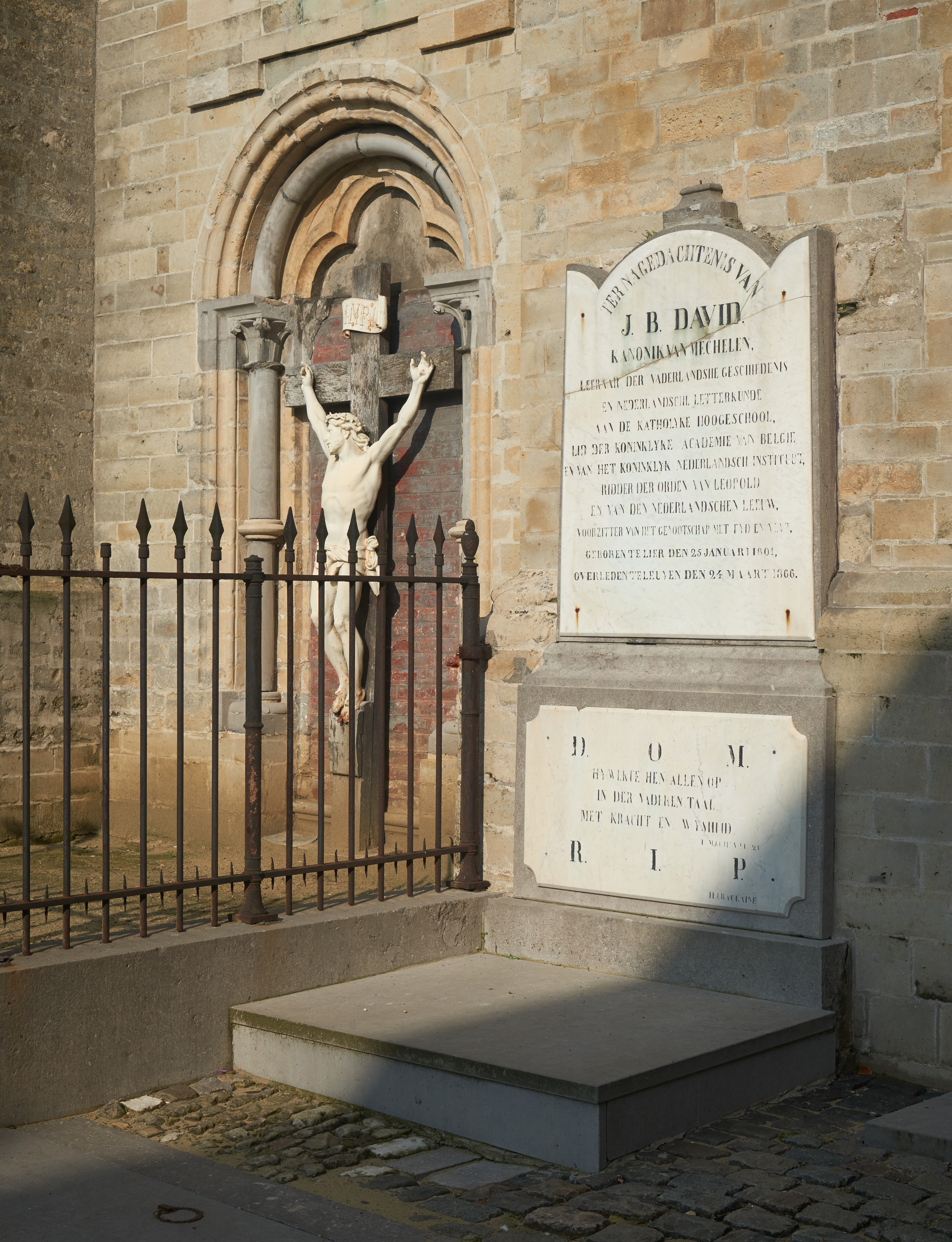 Graf van Jan Baptist David, Abdij van 't Park, Heverlee, Leuven, België. De tekst is: Ter nagedachtenis van J.B. David. Kanonik van Mechelen, leeraar der vaderlandshe geschiedenis en Nederlandsche letterkunde aan de katholyke hoogeschool, lid de koninklyke academie van Belgie en van het koninklyke Nederlandsch instituut, ridder der orden van leopold en van den Nederlandschen leeuw, voorzitter van het genootschap Tyd en Vlyt, geboren te Lier den 25 januari 1801, overleden te Leuven den 24 maart 1866.